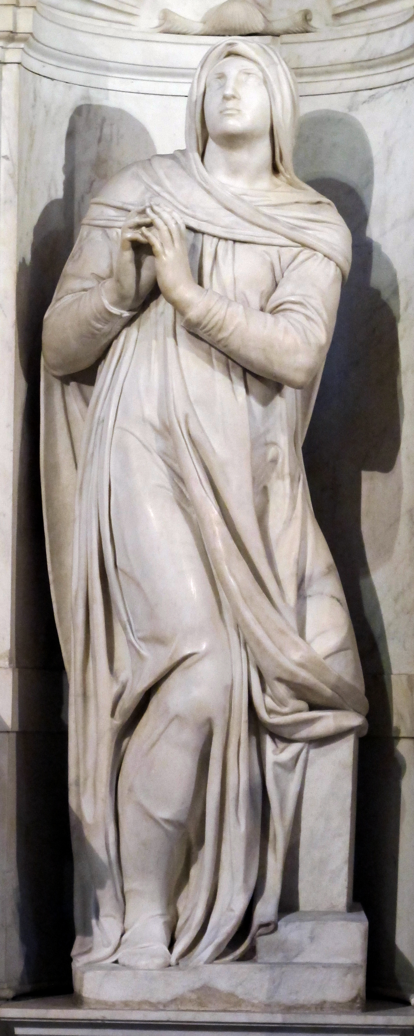 San pietro in vincoli, monumento a giulio II, rachele